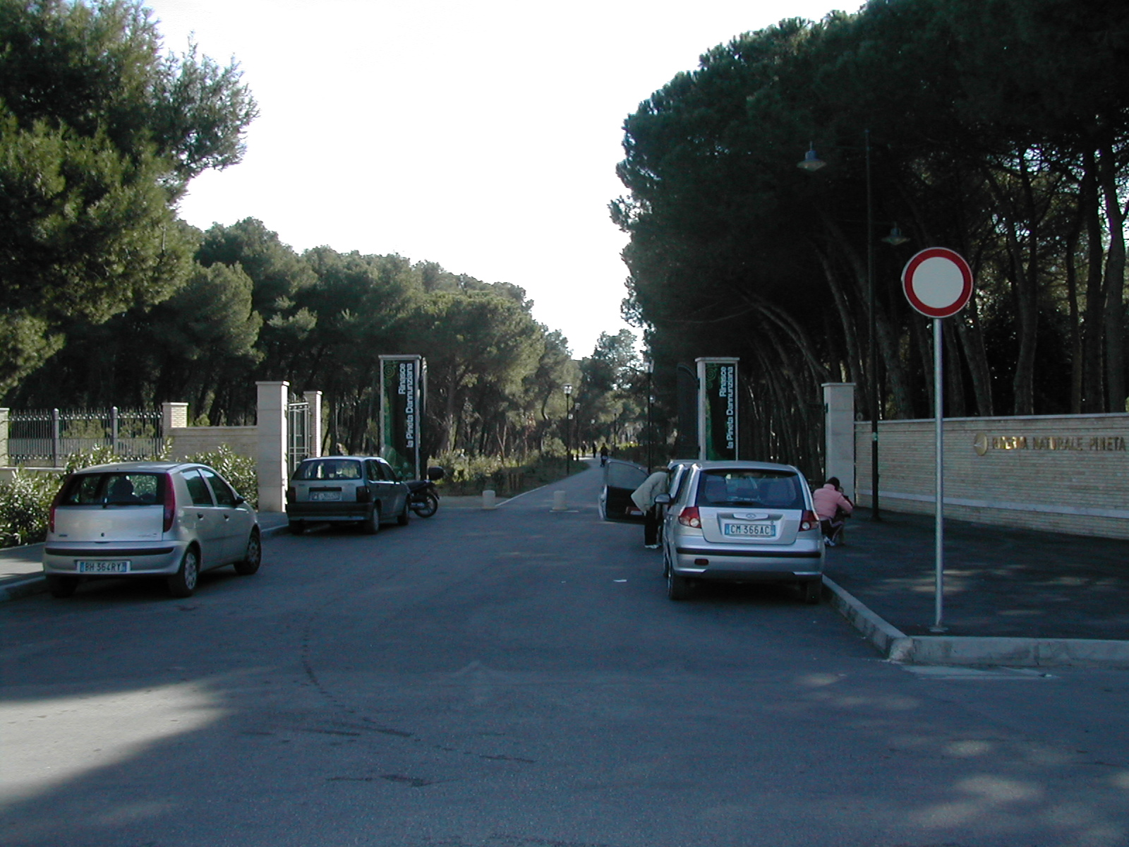 Pescara_Riserva_naturale_di_interesse_provinciale_Pineta_Dannunziana